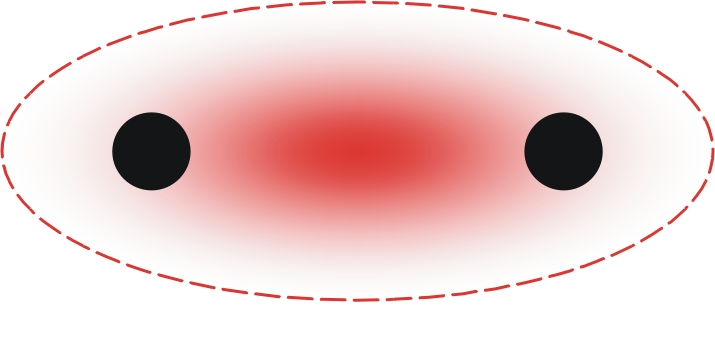 Pictura ligationis covalentis duarum atomorum